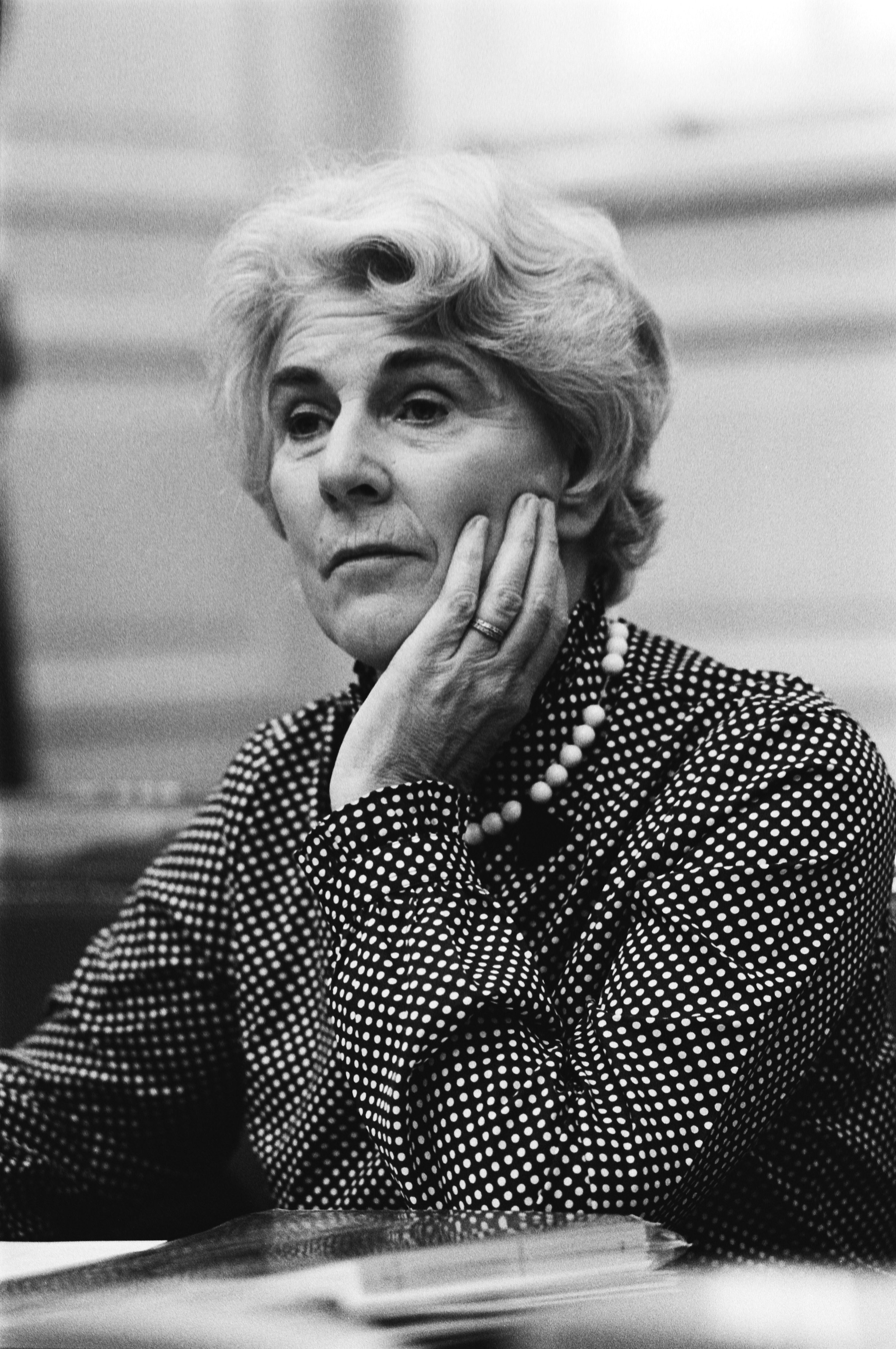 Collectie / Archief : Fotocollectie Anefo Reportage / Serie : Debat over de kortingen op ziekenhuisbedden in de Tweede Kamer Beschrijving : Minister Til Gardeniers Datum : 12 oktober 1982 Locatie : Den Haag, Zuid-Holland Trefwoorden : bezuinigingen, ministers, parlementaire debatten, portretten Persoonsnaam : Gardeniers-Berendsen, Til Fotograaf : Antonisse, Marcel / Anefo Auteursrechthebbende : Nationaal Archief Materiaalsoort : Negatief (zwart/wit) Nummer archiefinventaris : bekijk toegang 2.24.01.05 Bestanddeelnummer : 932-3614